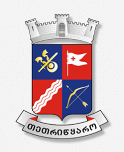 თეთრიწყაროს მუნიციპალიტეტის გერბი